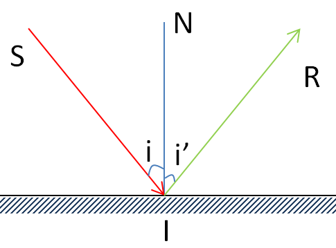 Tia phản xạ